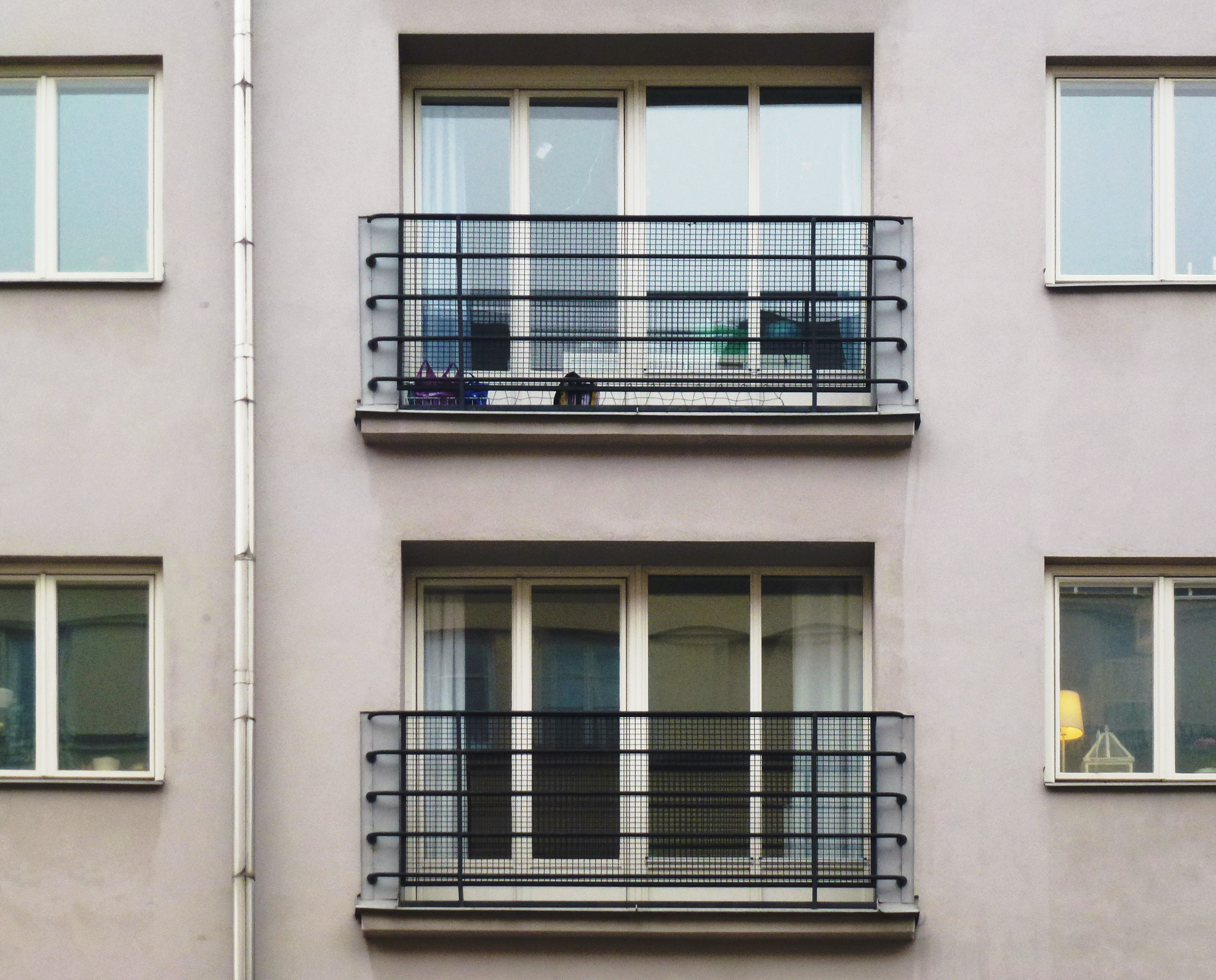 Fastigheten "Nattugglan 19" Götgatan/Folkungagatan, arkitekt Paul Hedqvist, fasaddetalj